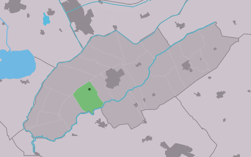 Kaartsje fan himrik fan Aldetrine